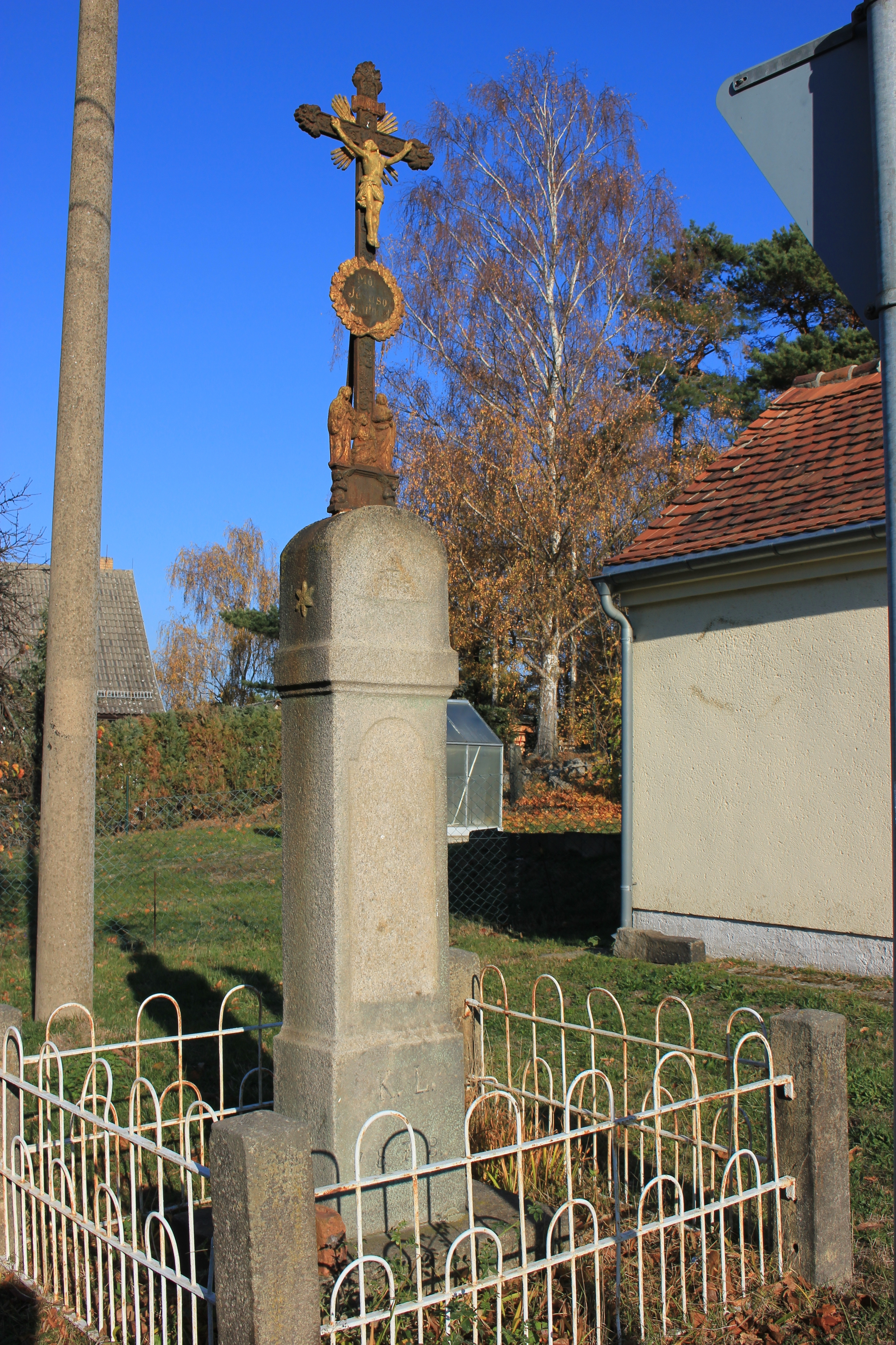 Hornjoserbsce: Swjaty křiž při Serbskej dróze w Brěmjenju.